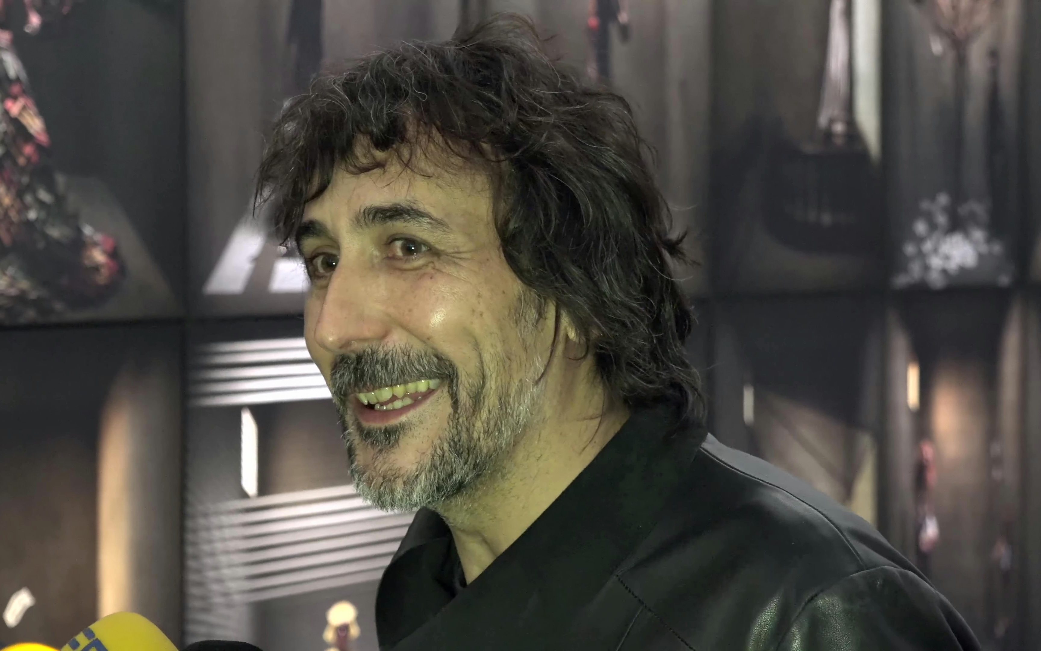 El Centro de Arte Tomás y Valiente (CEART) de Fuenlabrada acoge desde hoy la exposición más importante de fotografía del año: ‘365º’ de Eugenio Recuenco.